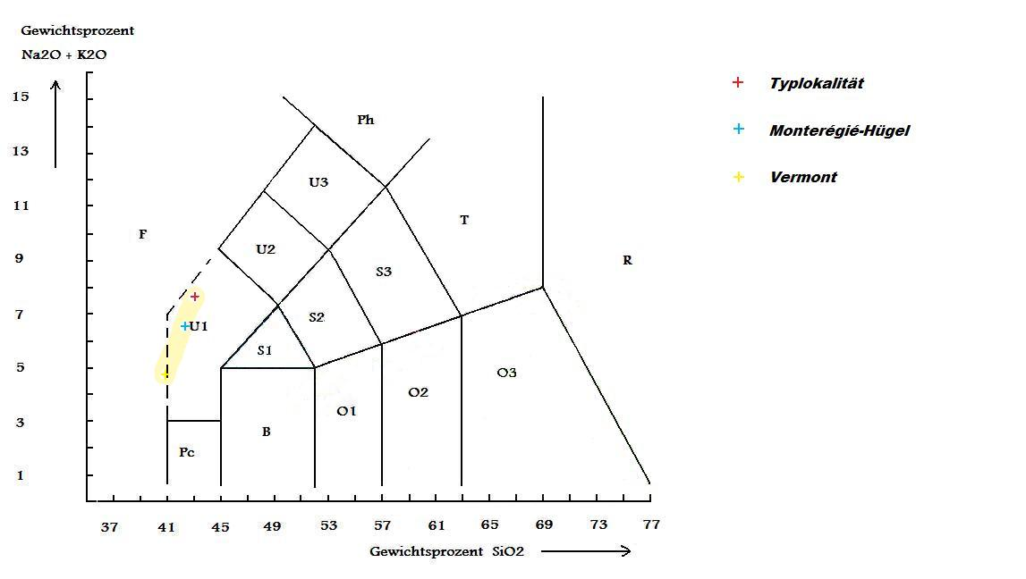 Monchiquit-Zusammensetzungen im TAS-Diagram